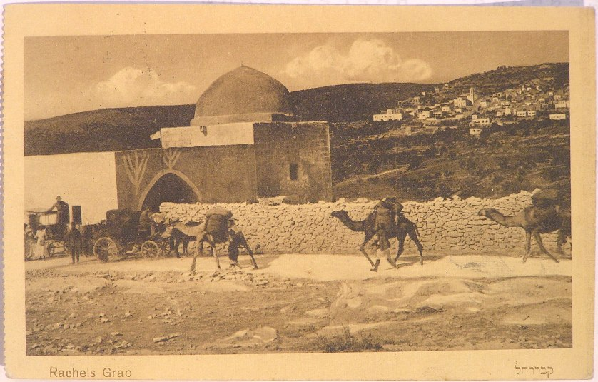 תמונה של he:קבר רחל בגלויה מראשית המאה ה-20